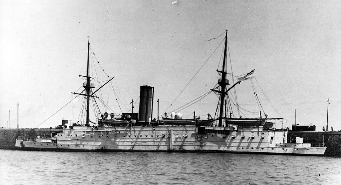 Crucero Patagonia. Flota de la Armada Argentina. 1887.